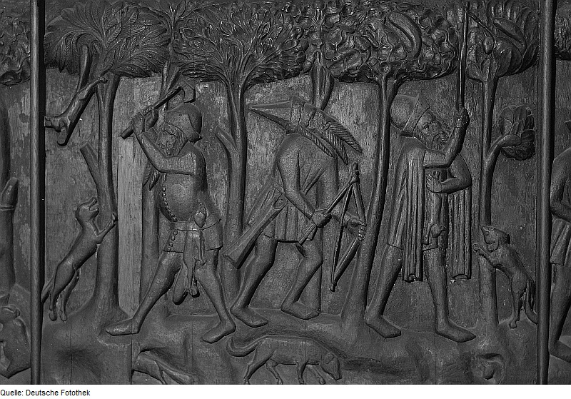 Original image description from the Deutsche Fotothek Stralsund. St.-Nikolai-Kirche, Rigafahrergestühl (auch: Russe-, Russland-, fälschlich Nowgorod-Fahrer-Gestühl), mittelalterliche Bildtafeln mit Darstellungen des Russlandhandels der Hansezeit, das Gestühl war eines von 56 Altären der Kirche (um 1360 bis 1370), Russen bei der Jagd nach den Pelztieren